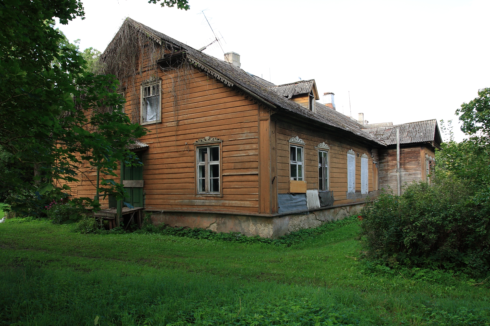 Kumna mõisa vana peahoone, 18.saj